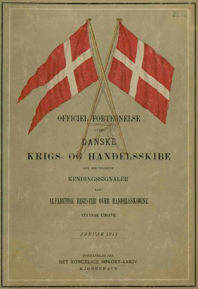 skibsregister